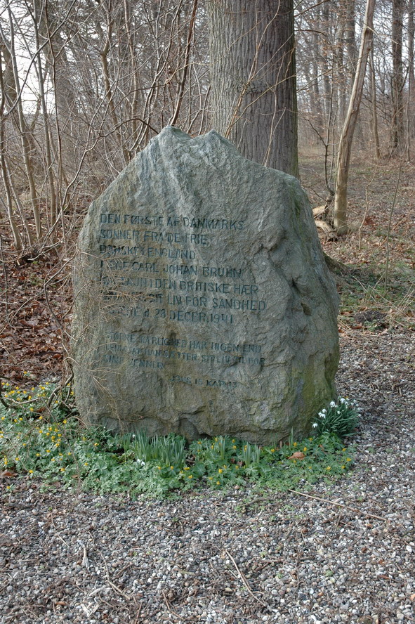 Mindesten for Carl Johan Bruhn i Torpeskov ved Haslev